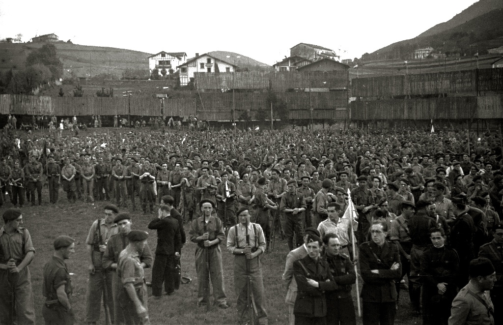 Título original: Desfile de la 5ª Bandera en Tolosa (15/19) Localización: Tolosa (Guipúzcoa)